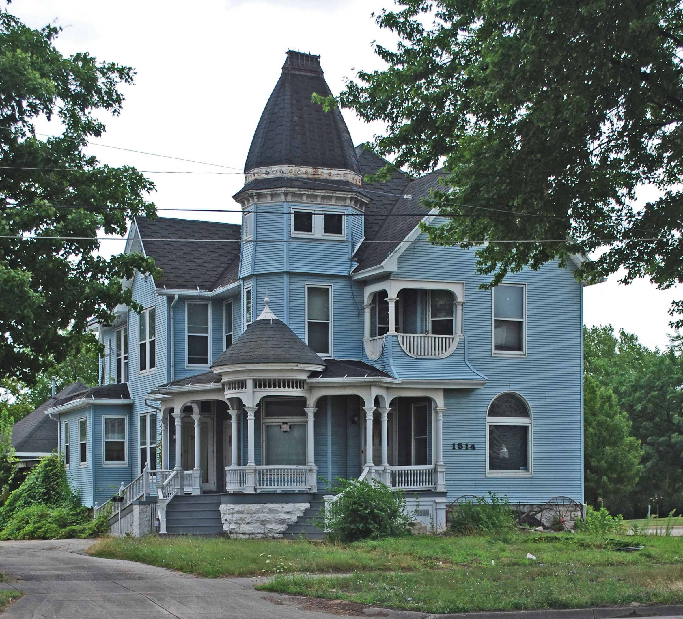 House at 1514 N Michigan, Saginaw MI